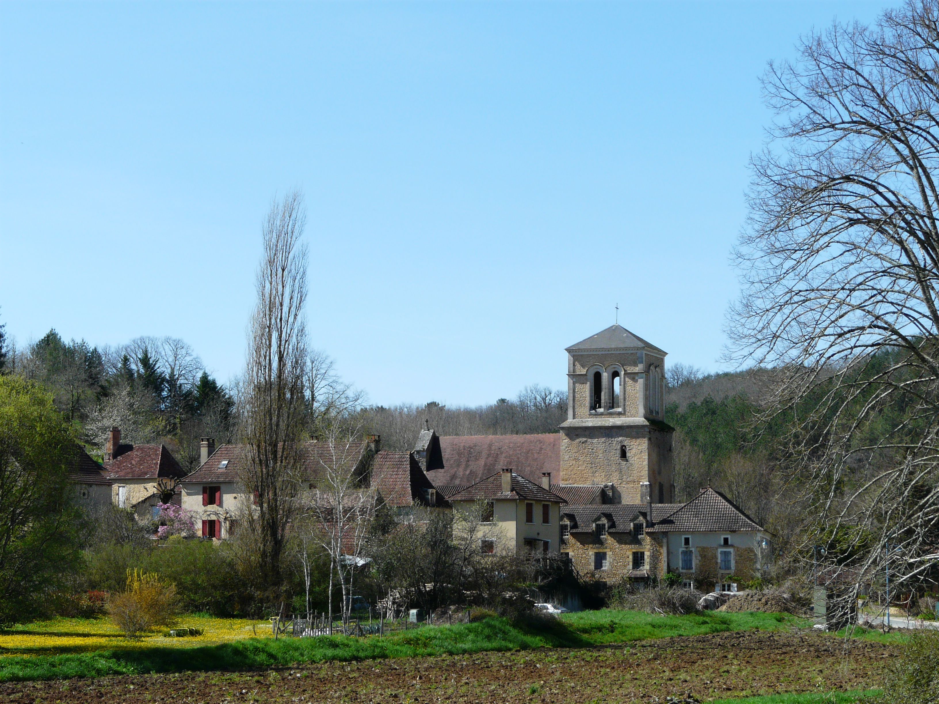 Le village de Journiac, Dordogne, France.